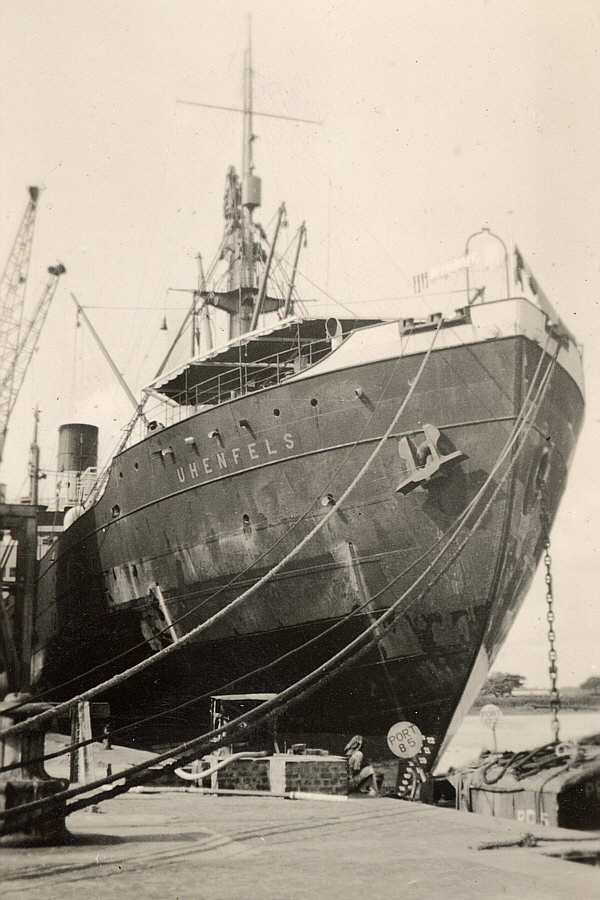 Der Maier-Bug der Uhenfels 1931